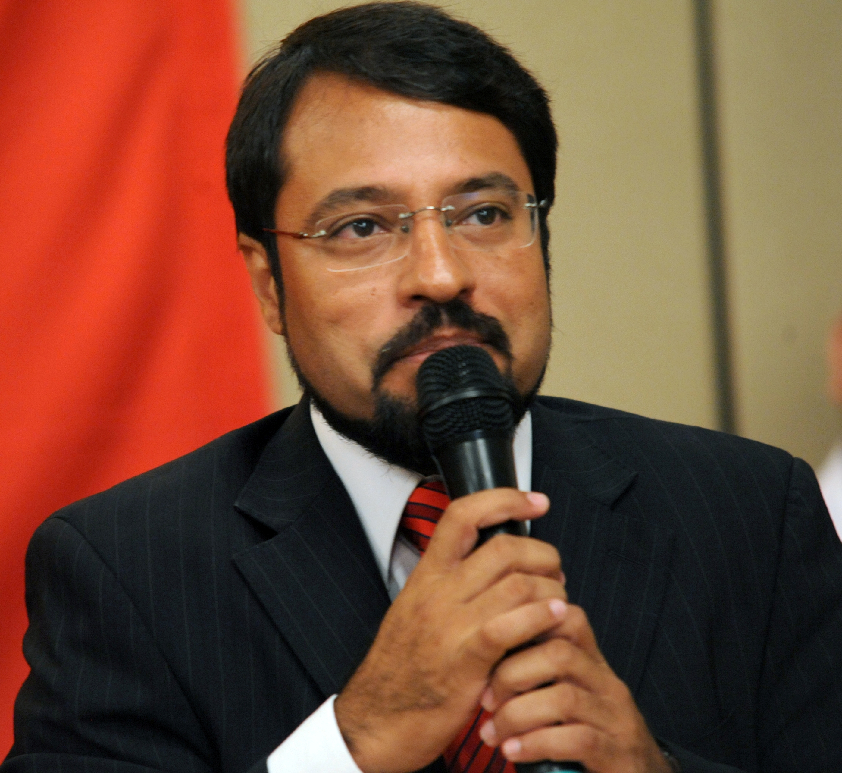 O governador eleito do Amapá, Camilo Capiberibe, durante reunião da Executiva Nacional do PSB